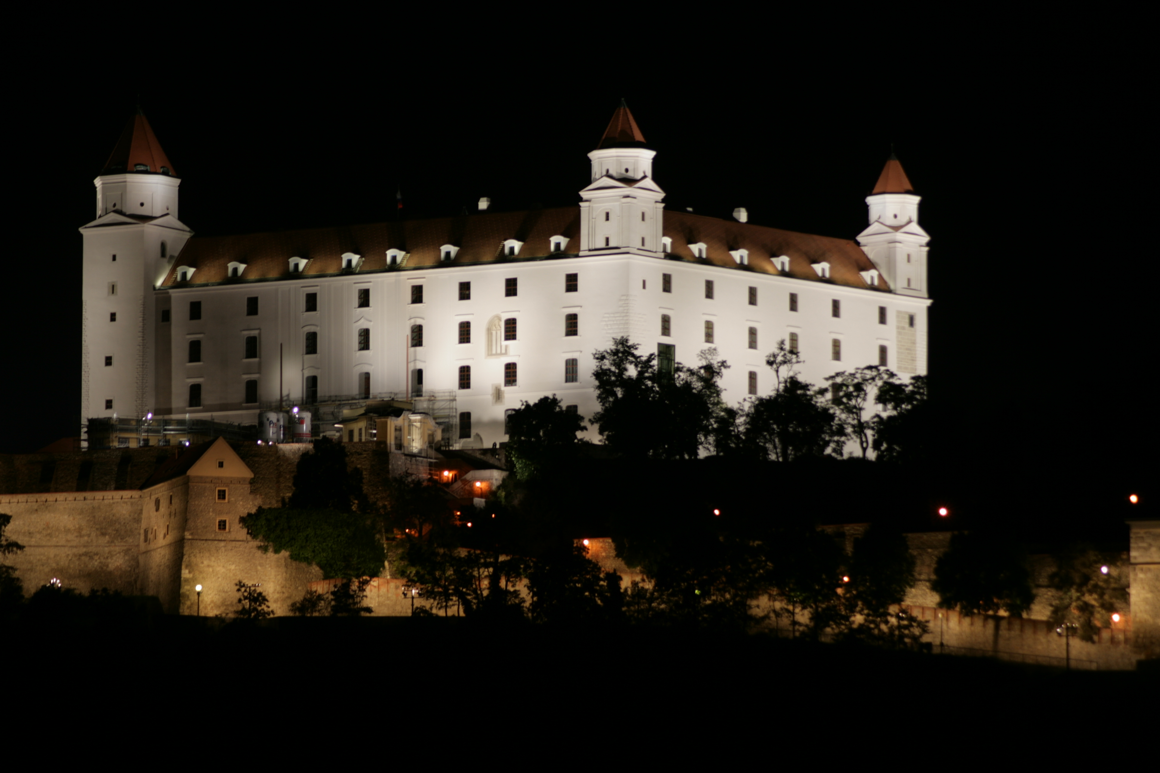 Bratislavský hrad pri nočnom osvetlení v septembri 2009